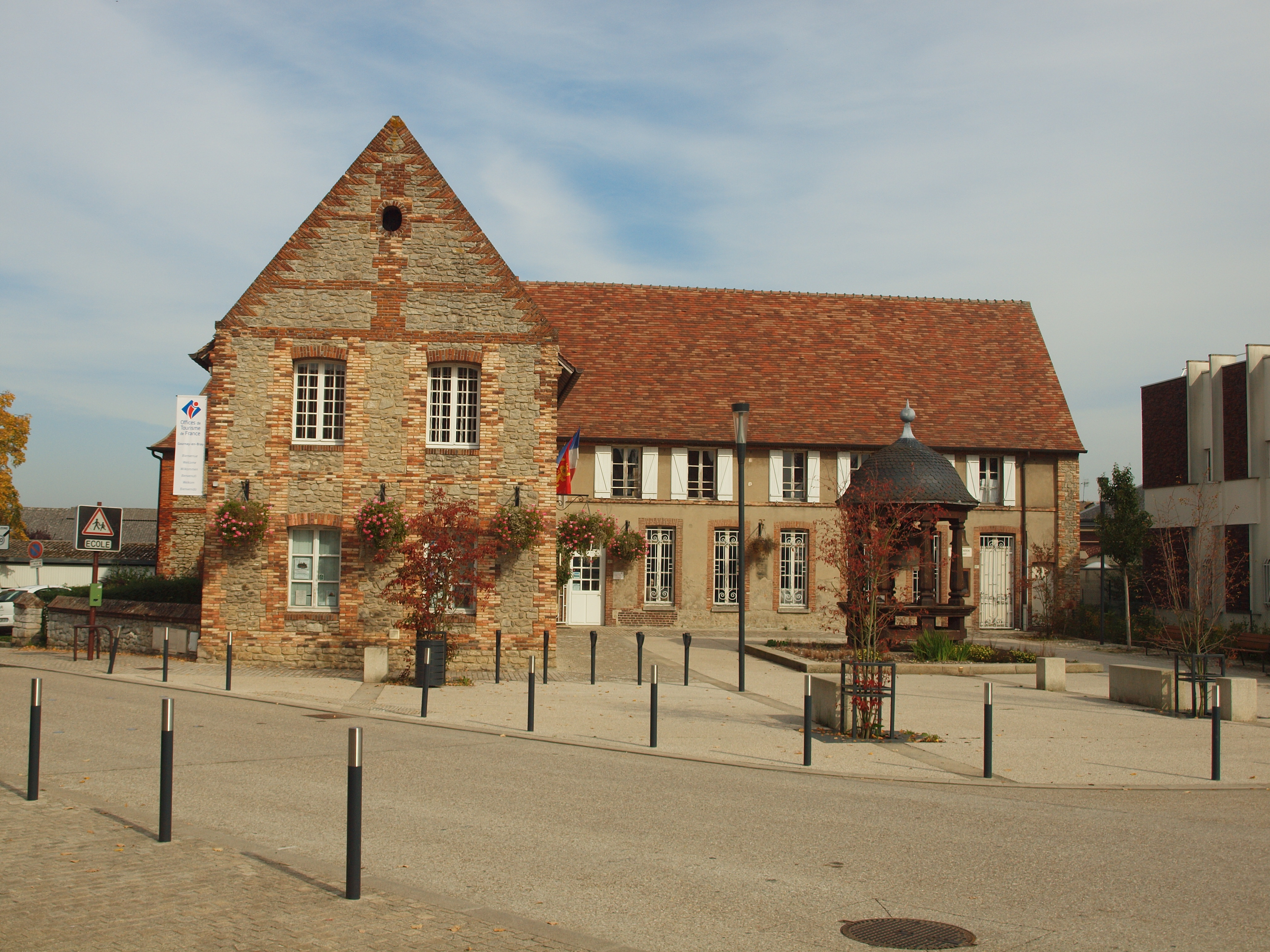 Office de tourisme de Gournay-en-Bray (Seine-Inférieure, France)